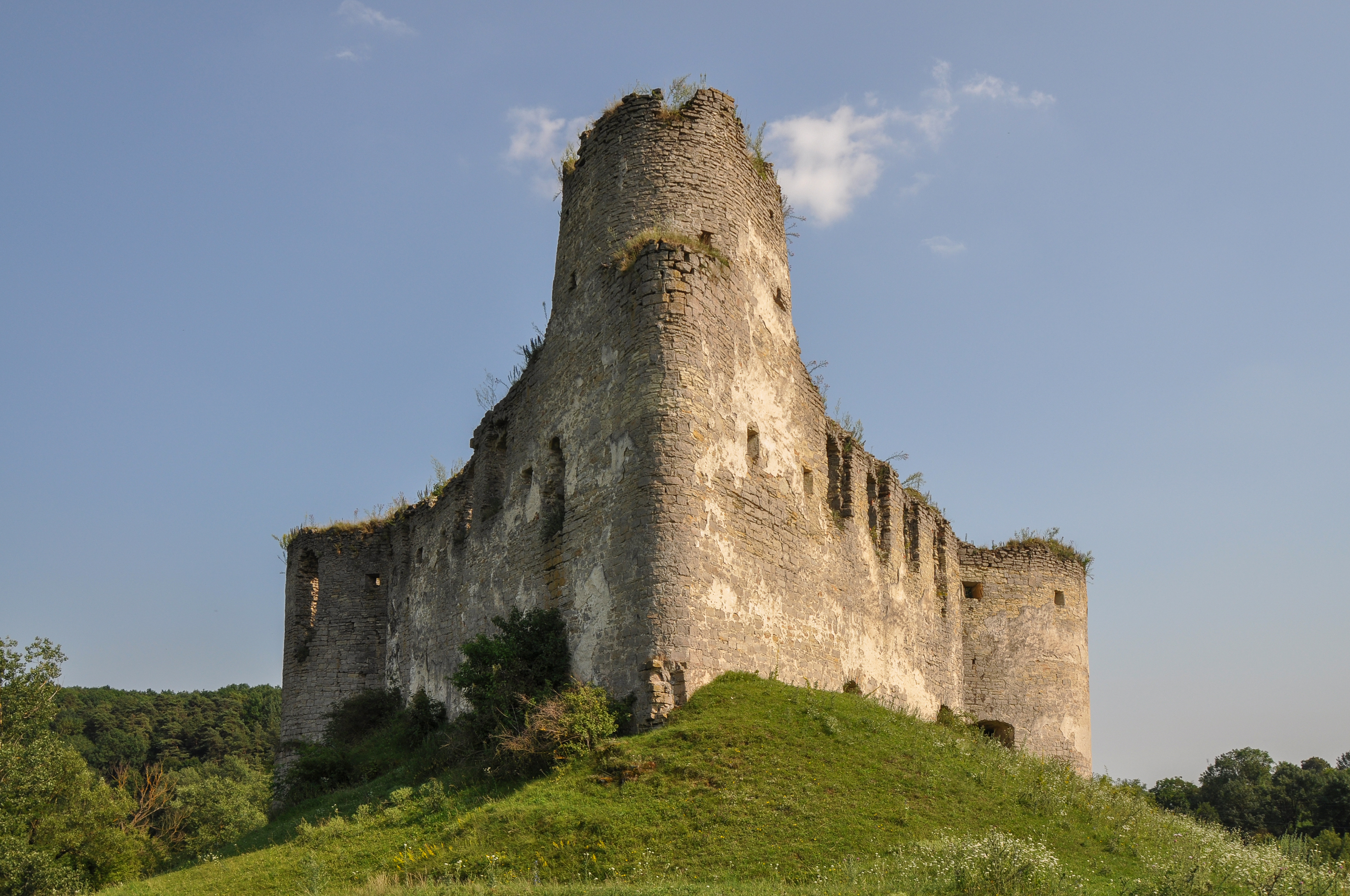 Замок, Сидорів